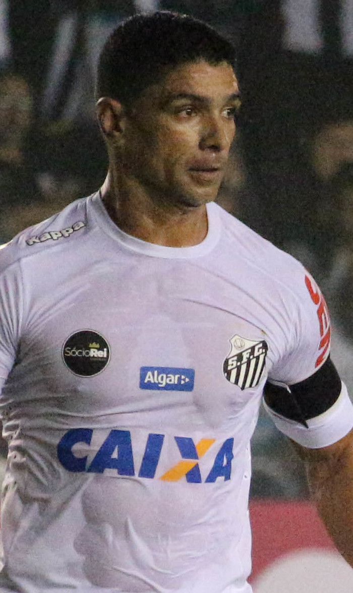 Foto: Douglas Teixeira/Futebol Santista